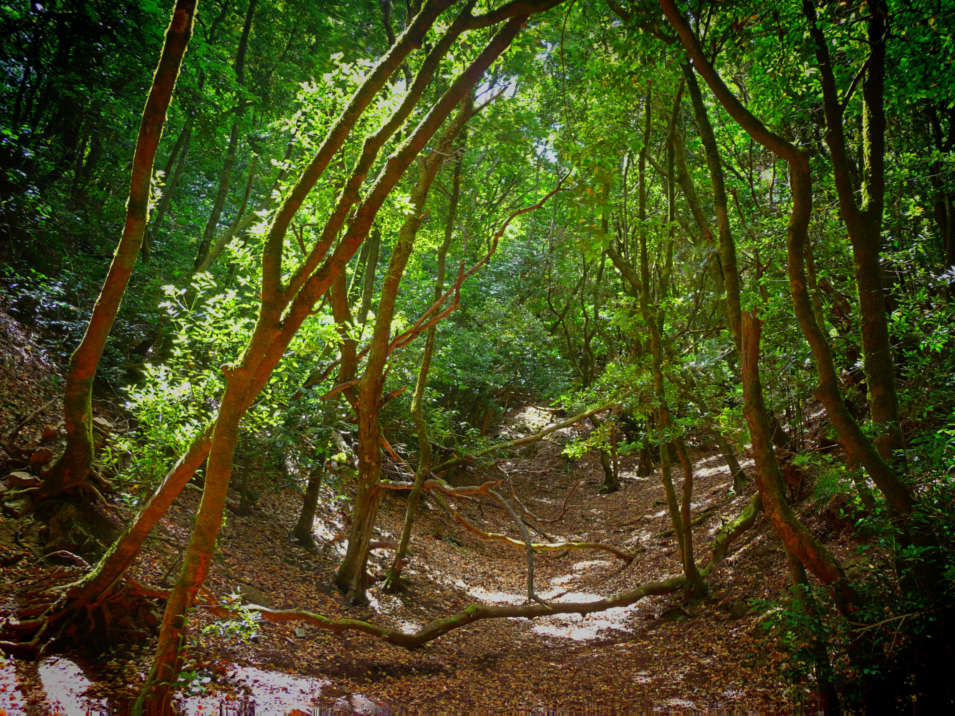 Batán de Arriba (Tenerife)